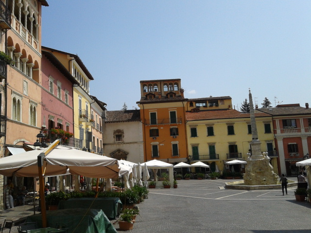 Piazza Obelisco a Tagliacozzo